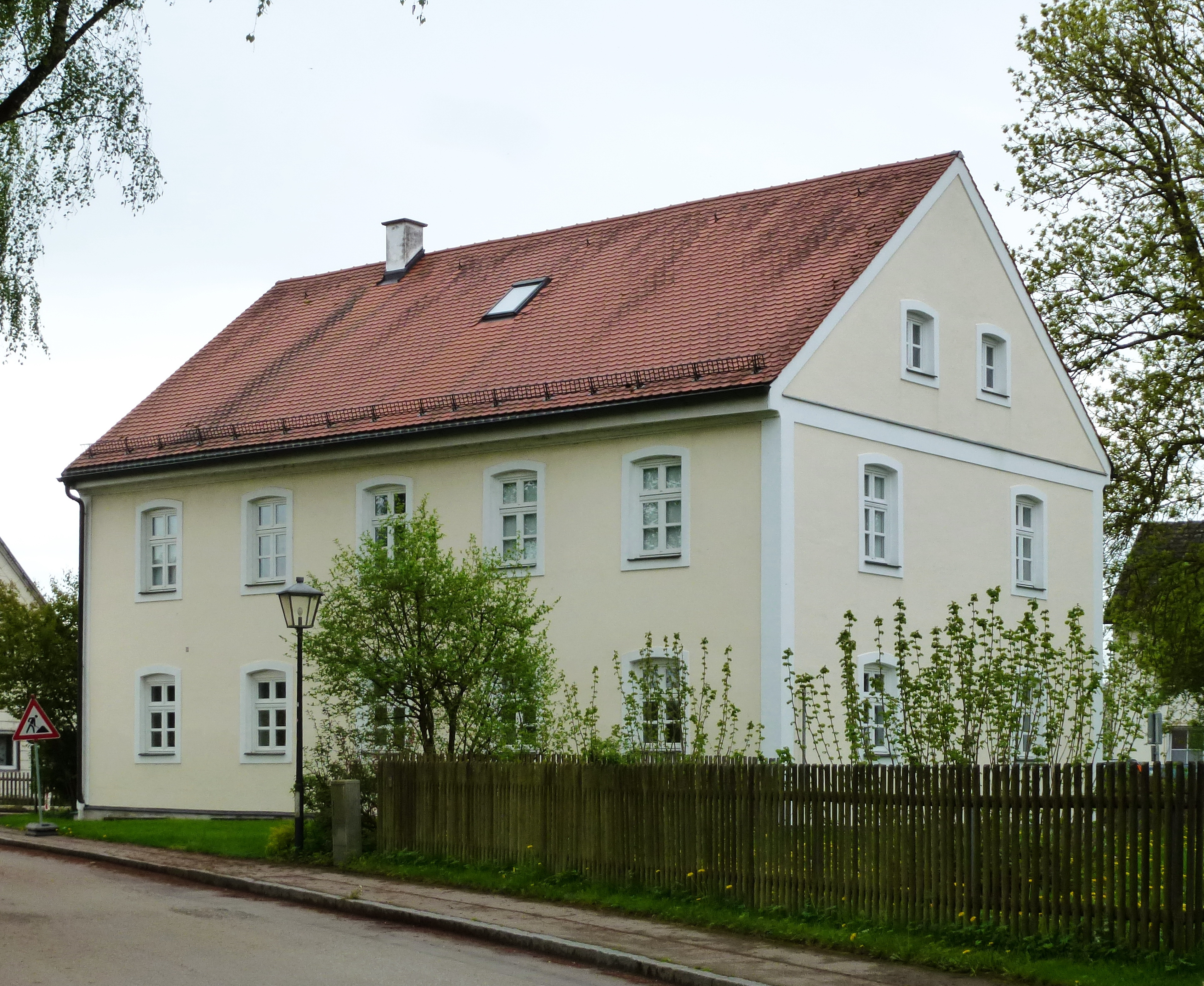 Großberghofen (Gde Erdweg)_Walkertshofener Str14: Ehemalige Pfarrhof Expositur (d.h. Seelsorgebereich ohne eigene Vermögensverwaltung), lt. Tafel am Haus erbaut 1859, renoviert 1996. Ansicht von SW